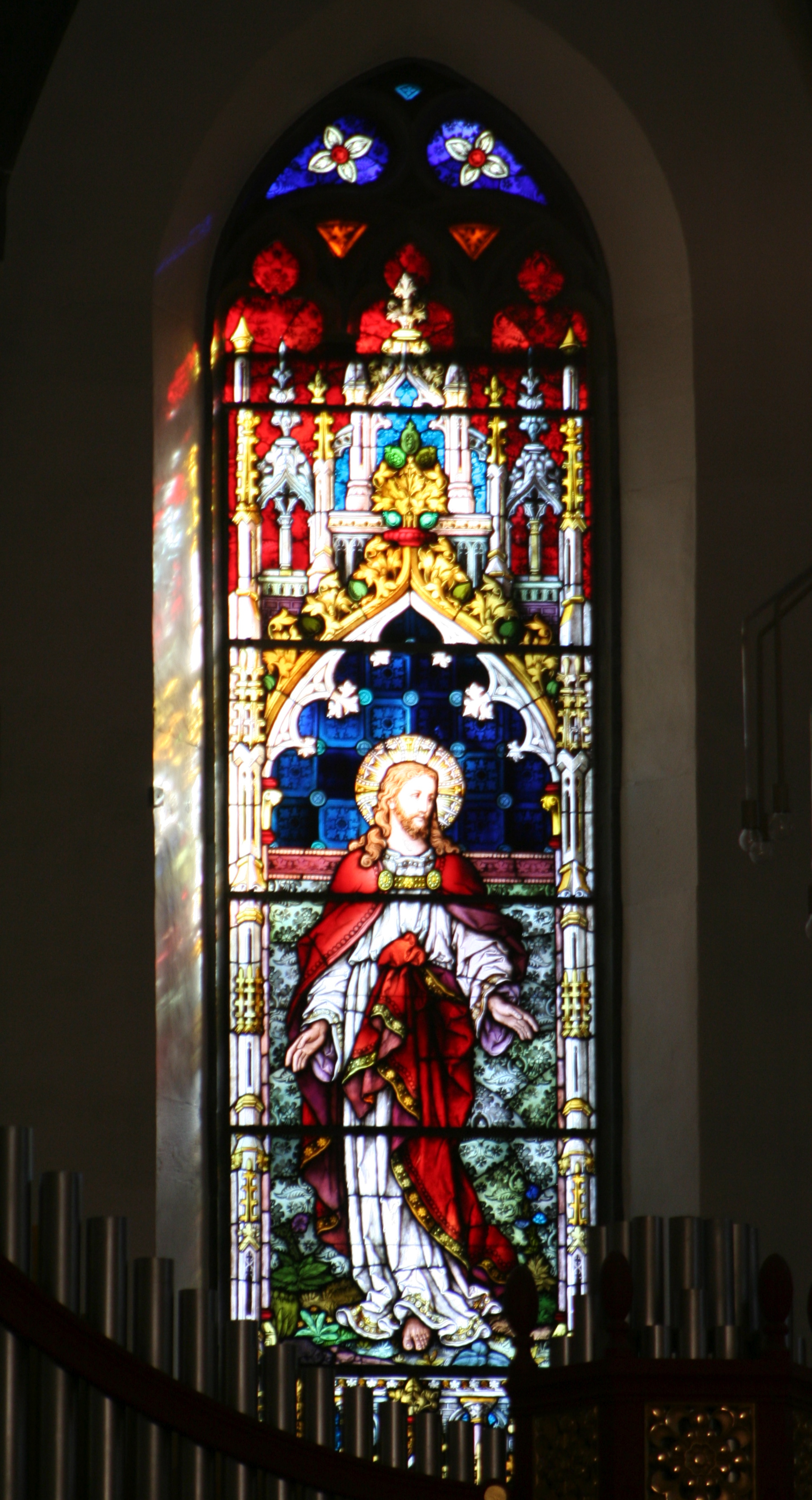 St. Martin (Chur), Glasfenster von 1890